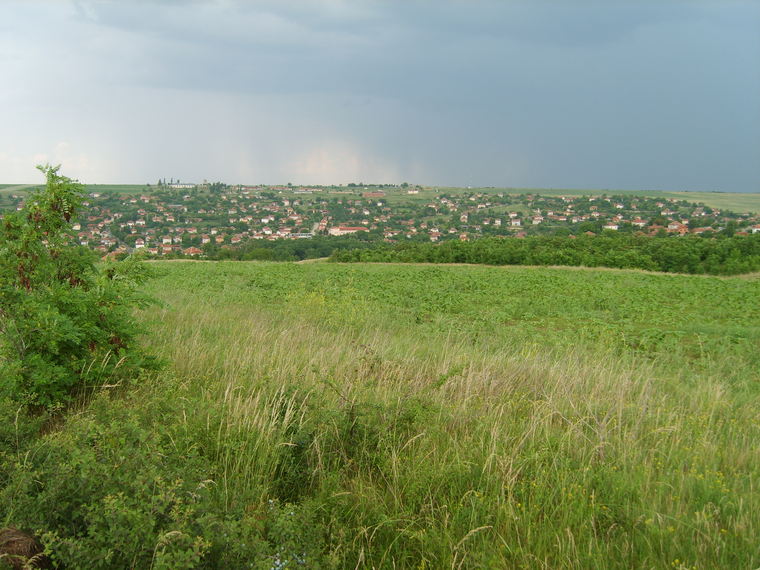 Изглед към село Лесура